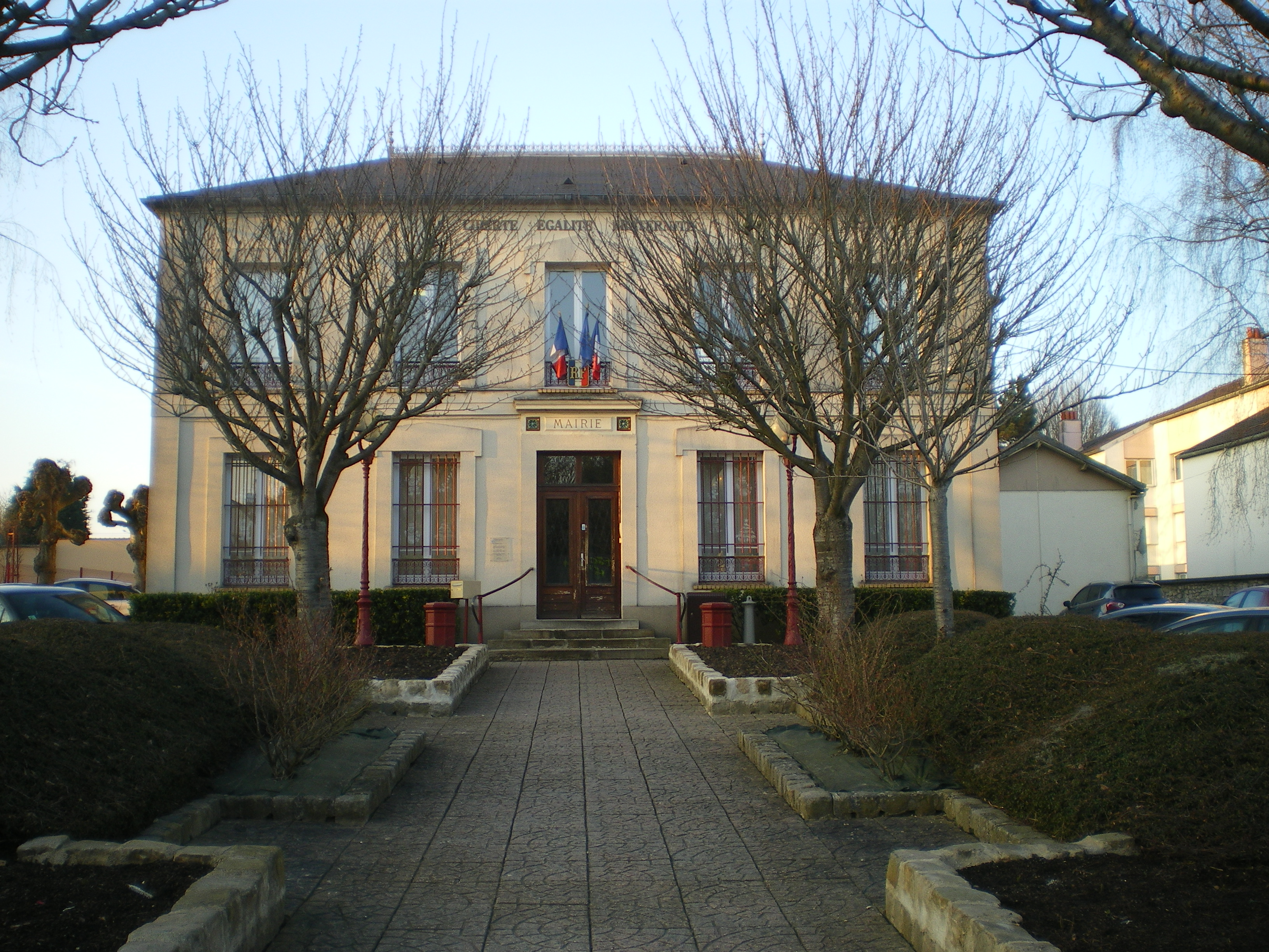 Mairie de Saint-Mard